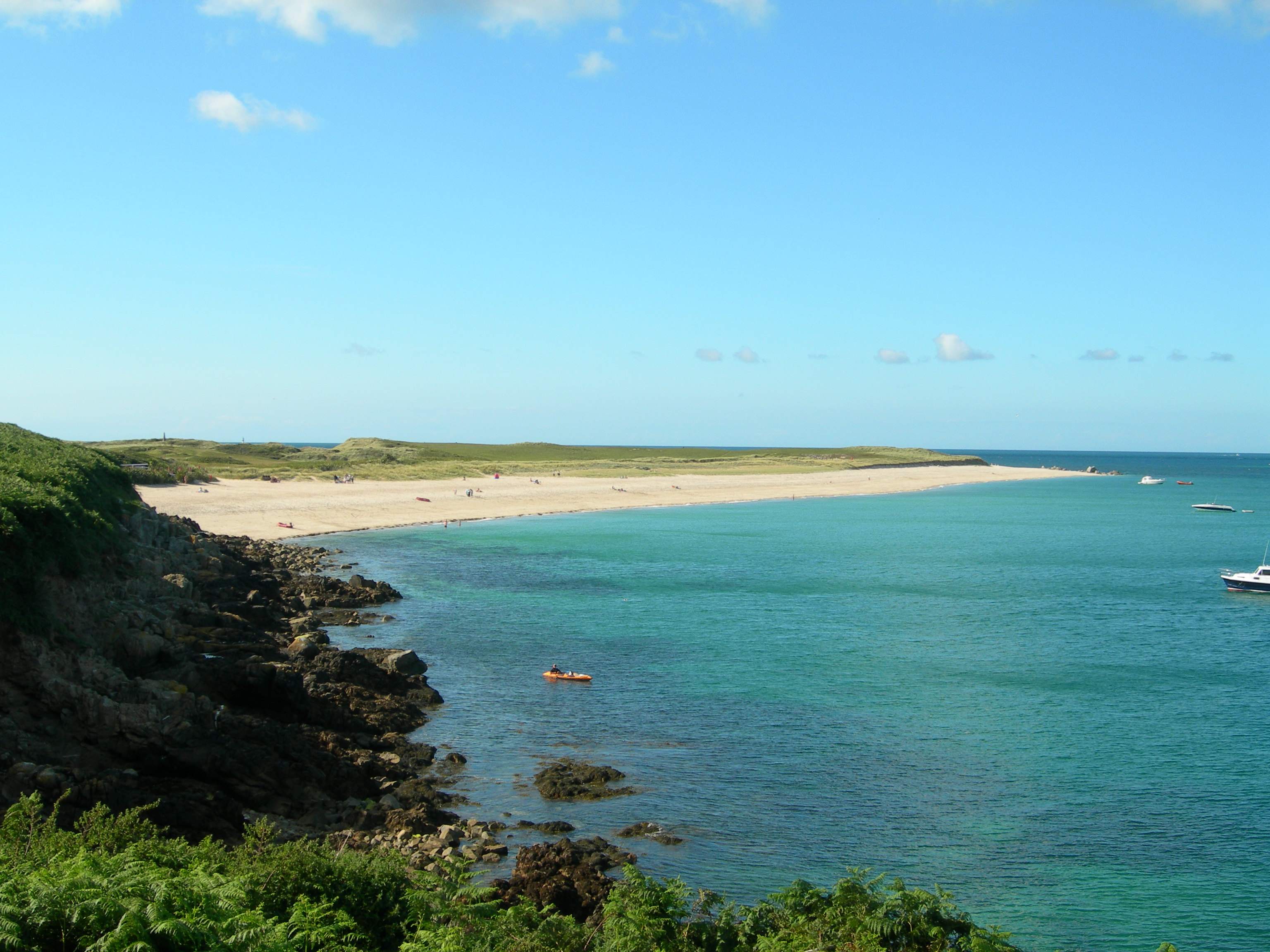 Plage des coquillages sur l'ile de Herm